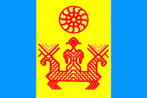 Izsorok zászlaja